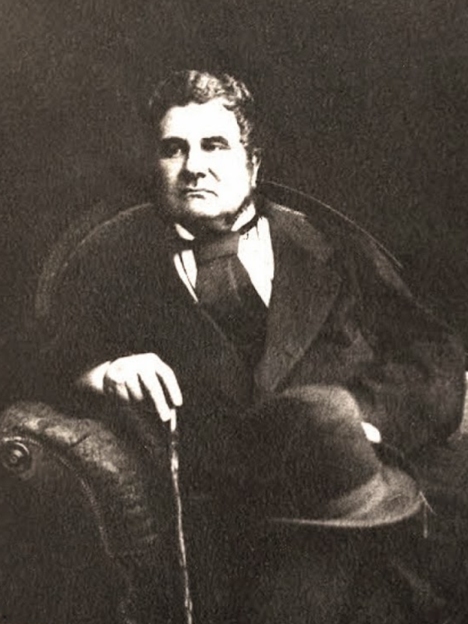 José Ignacio Larraín Landa; político chileno. Nació en Santiago en 1813. Falleció en la misma ciudad en 1892. Hijo de José Joaquín Larraín y Aguirre, heredero del Marquesado de Montepío y de Mercedes de Landa y de los Ríos. Tuvo una educación privilegiada, graduándose en 1836 como abogado de la Universidad de San Felipe. Casado con Carolina Zañartu y Larraín, con quien tuvo doce hijos. Fue, Marques de Montepio y tuvo el mayorazgo de las Propiedades del Fundo de "Lo Aguirre", la "Chacra del Manquehue" o Fundo Lo Gallo, y el Palacio Larrain Zañartu en Morande con Compañía.